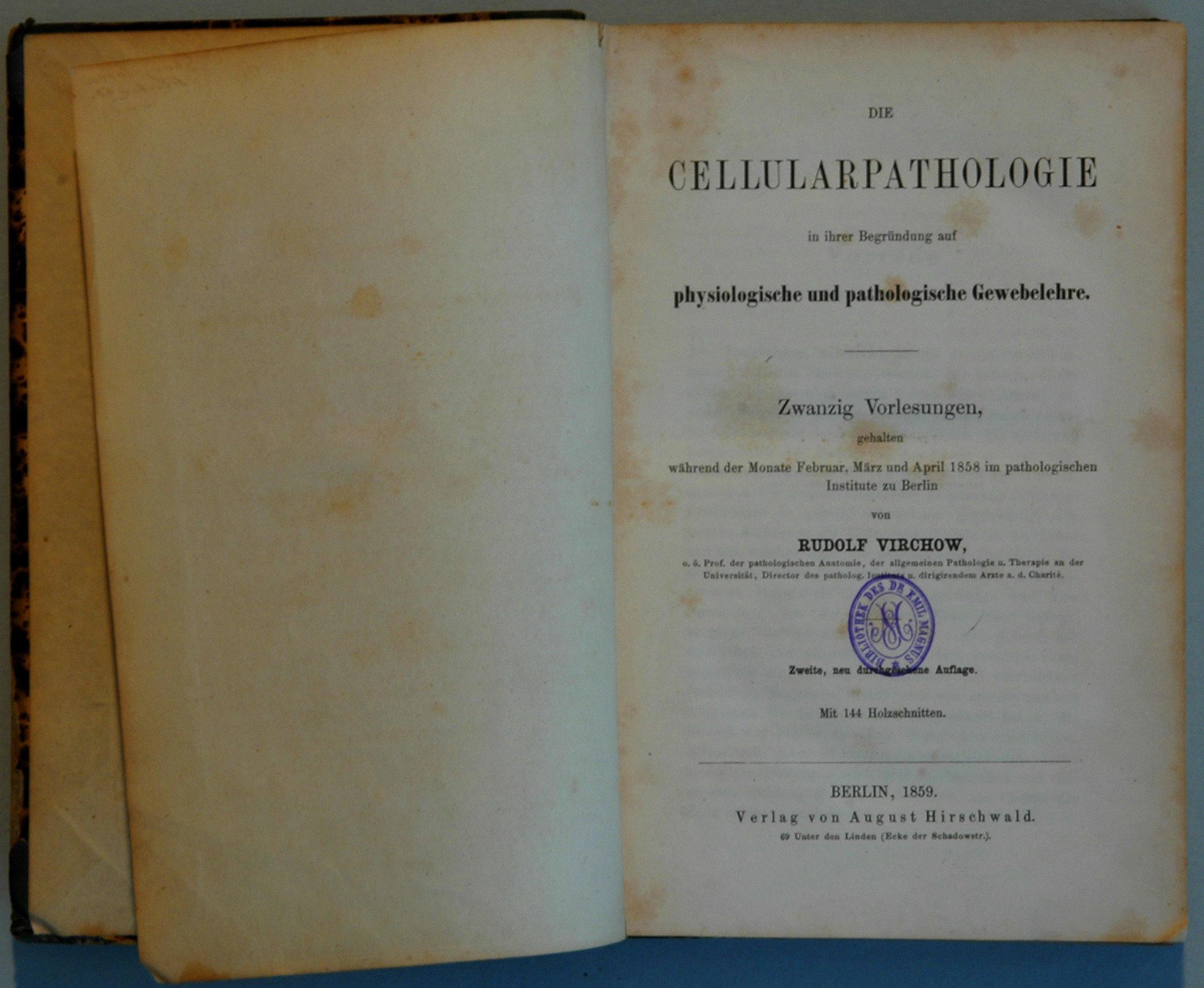 Titelblatt von Band I, Erstausgabe. Zweite Auflage der «Zellularpathologie» von Rudolf Virchow von 1859 (Erstausgabe 1858). Exemplar aus der Slg.